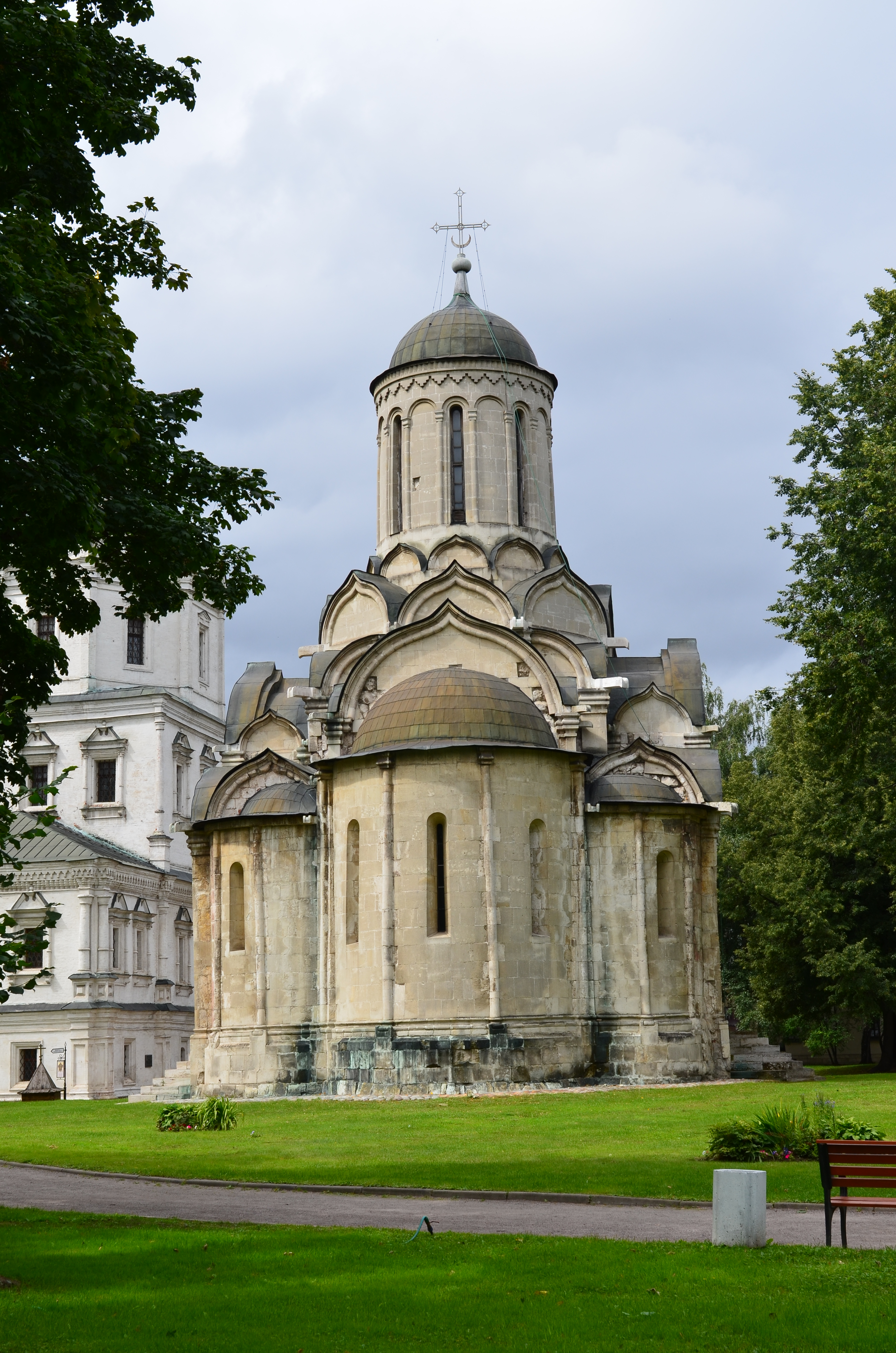 Ансамбль Андроникова монастыря (музей древнерусской культуры и искусства им. А. Рублева) (Москва и Московская область, Москва, Андроньевская площадь, 10)